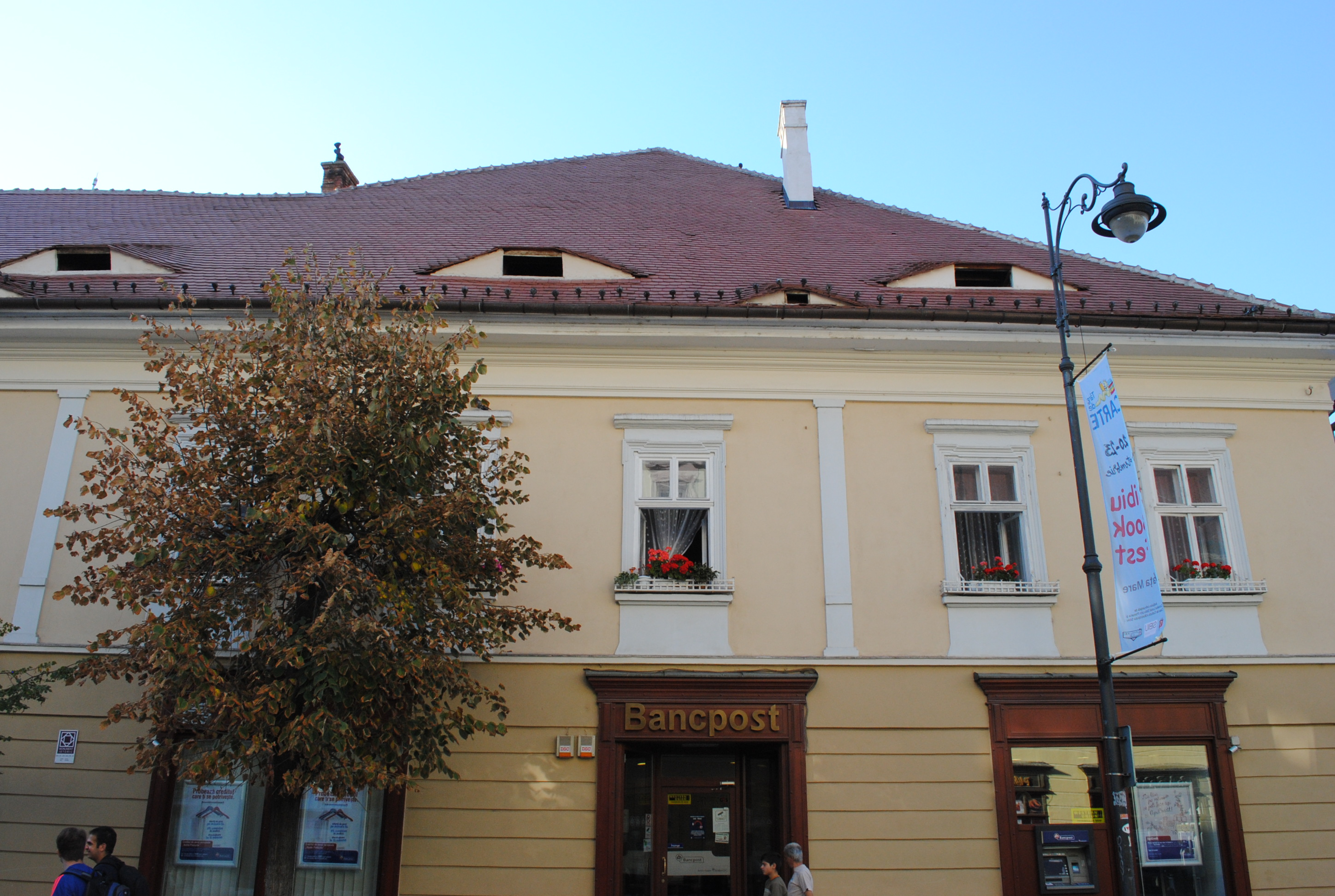 Casă, sec. XV - XVI, sec. XVII, 1800 - 1825, 1936